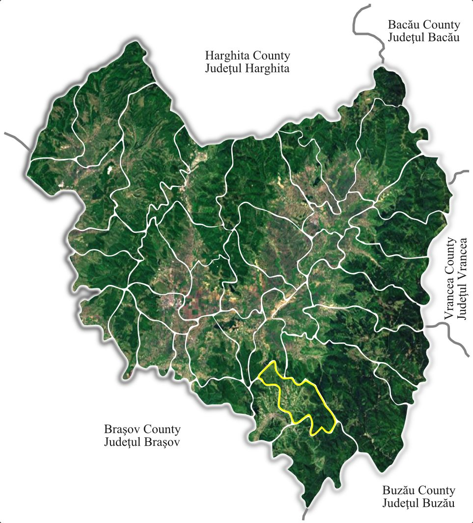 Barcani jud Covasna